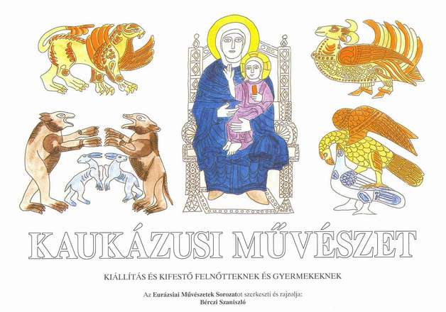 A Kaukázusi művészet c. füzet borítóján Aktamár templomának falfaragásai